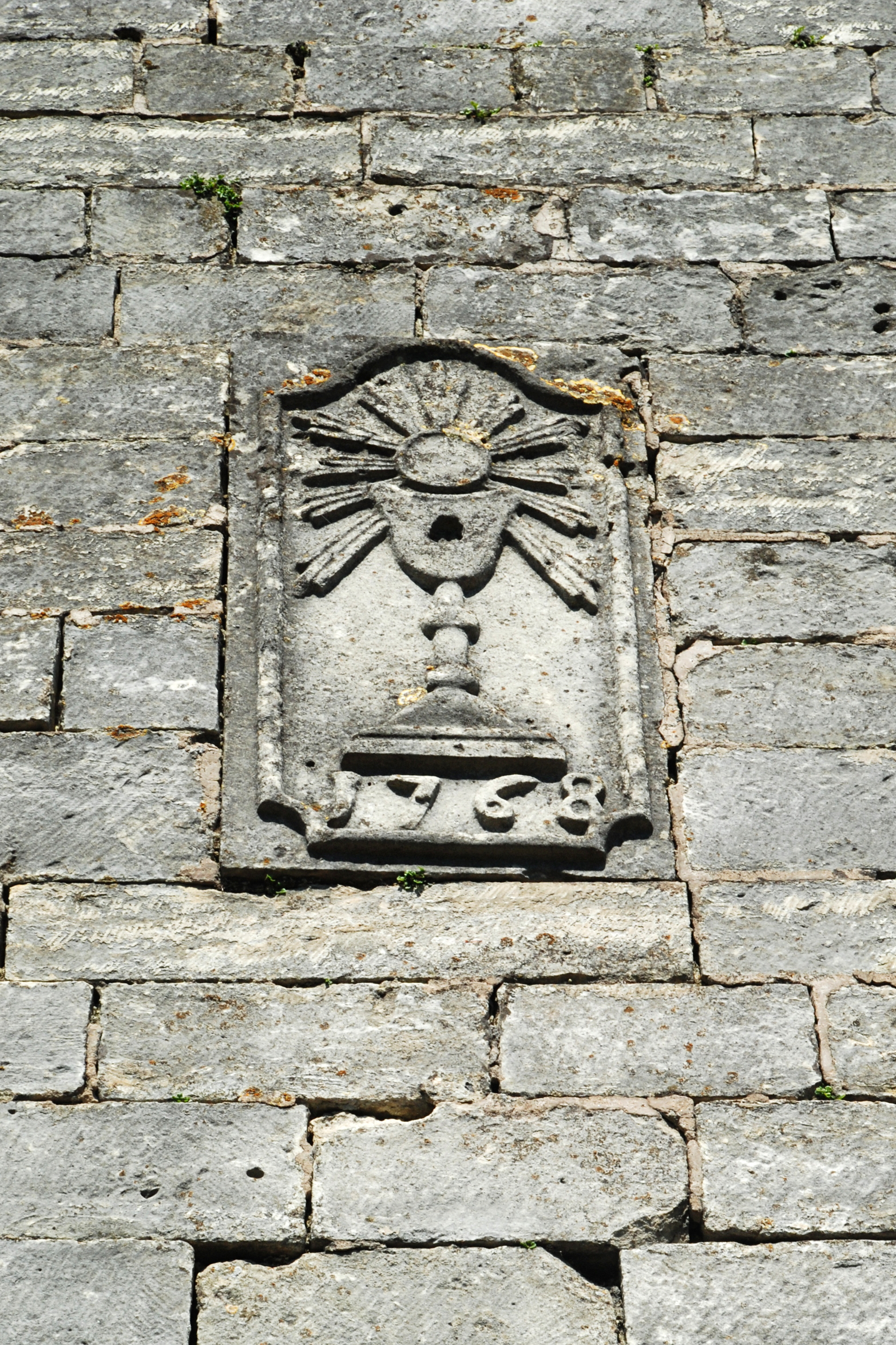 Belgique - Brabant wallon - Jodoigne - Saint-Remy-Geest - Église Saint-Remy